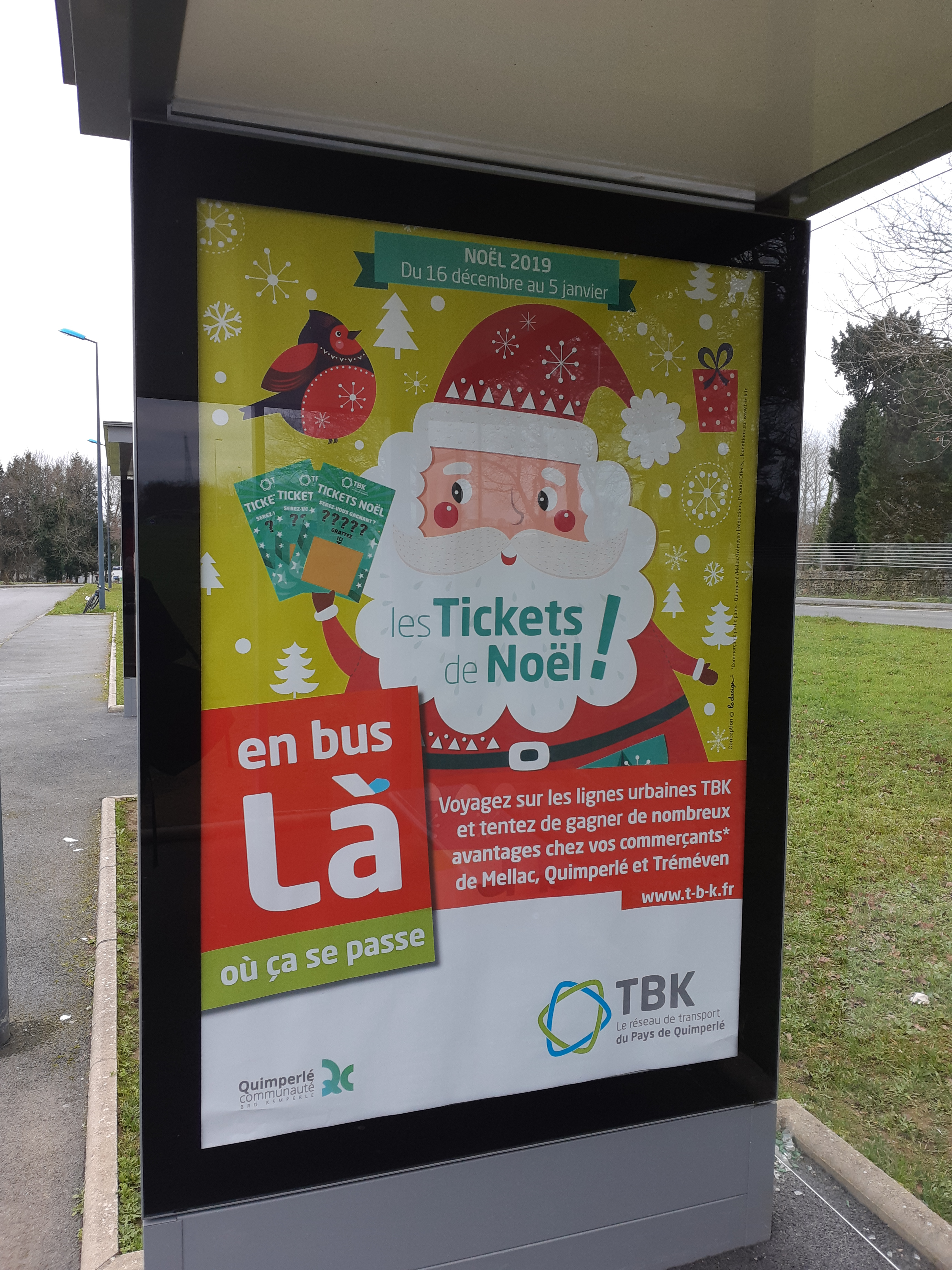 Affiche pour les tickets de Noël à gratter donné dans les lignes urbaines en décembre 2019 pour Noël.